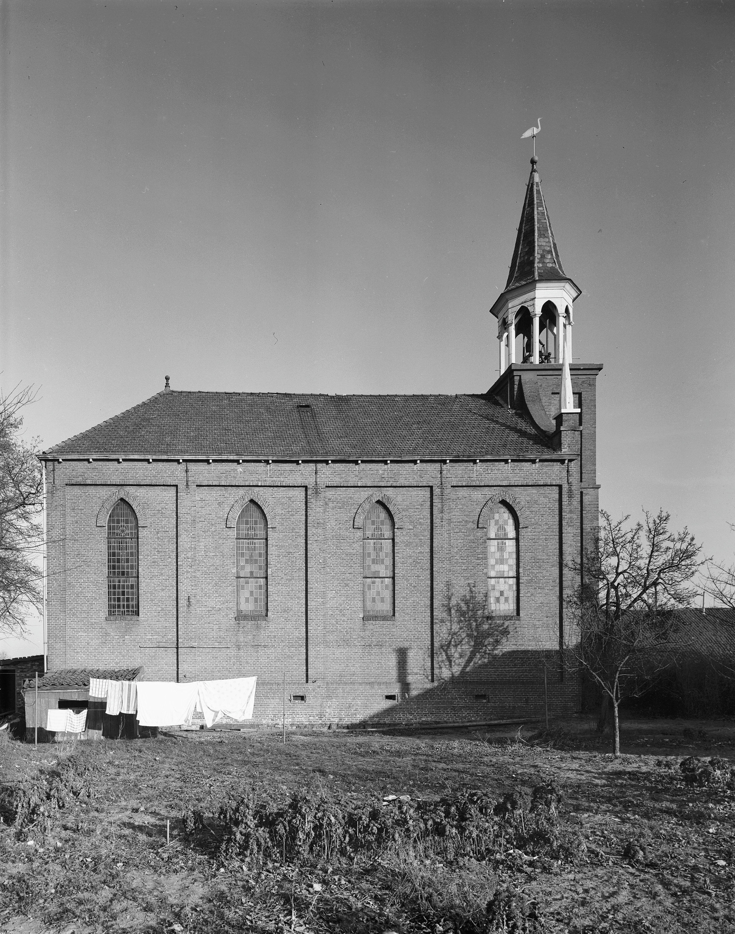 Lutherse Kerk: zuid-zijde exterieur